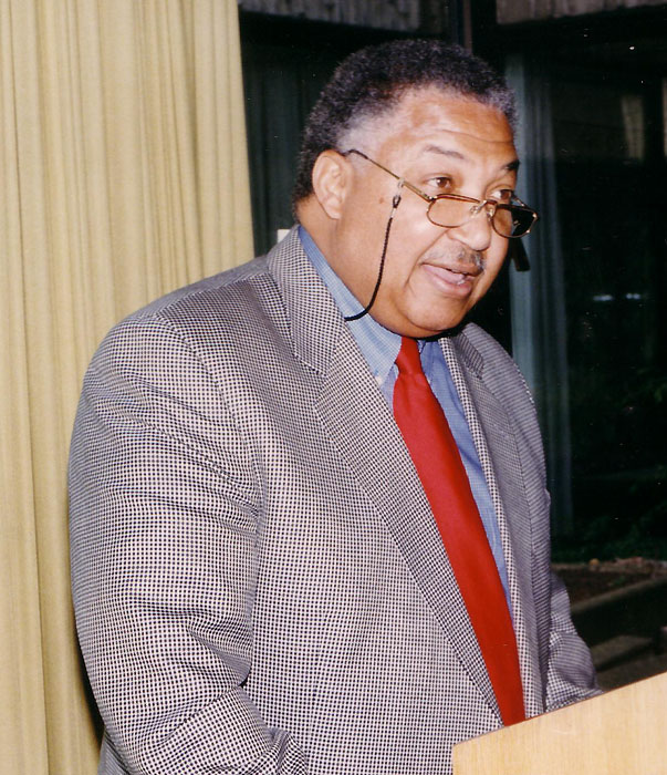 Jean Claude Diallo bei einer Ansprache zum 10-jährigen Jubiläum des Psychosozialen Zentrums für Flüchtlinge Düsseldorf